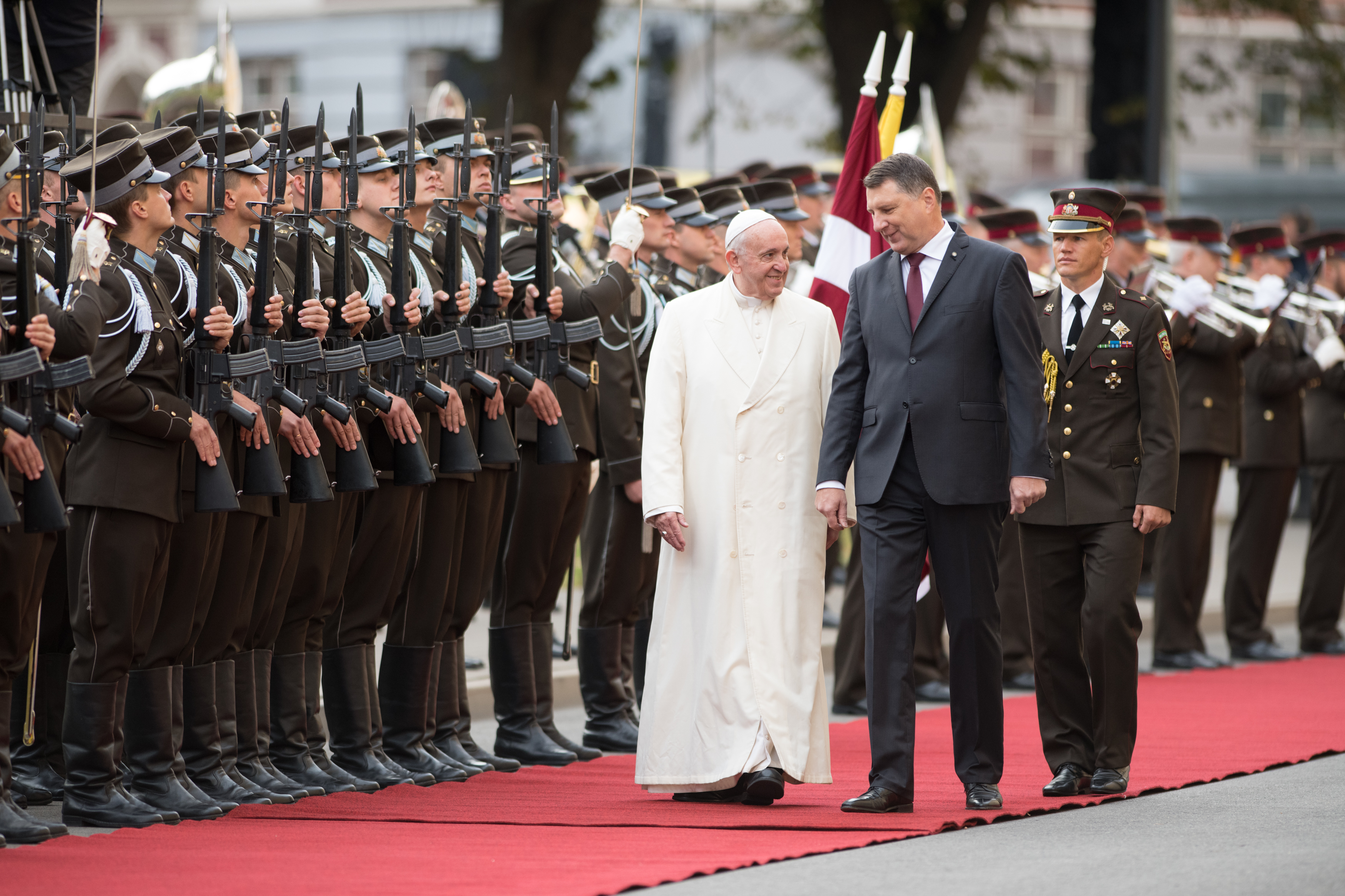 2018.gada 24.septembris. Viņa Svētības pāvesta Franciska oficiālā sagaidīšanas ceremonija. Foto: Ernests Dinka, Saeima Izmantošanas noteikumi: saeima.lv/lv/autortiesibas